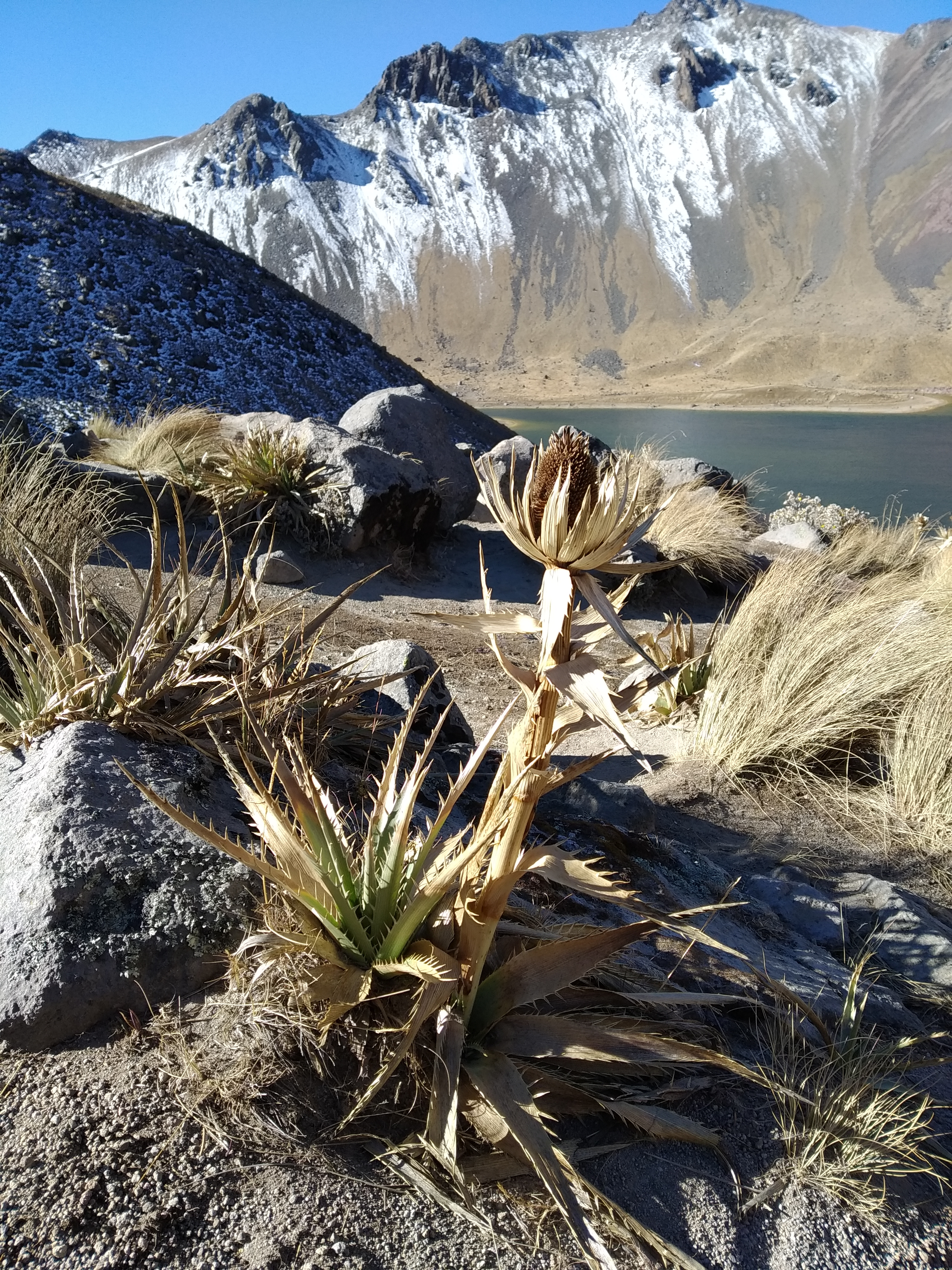 Eryngium monocephalum